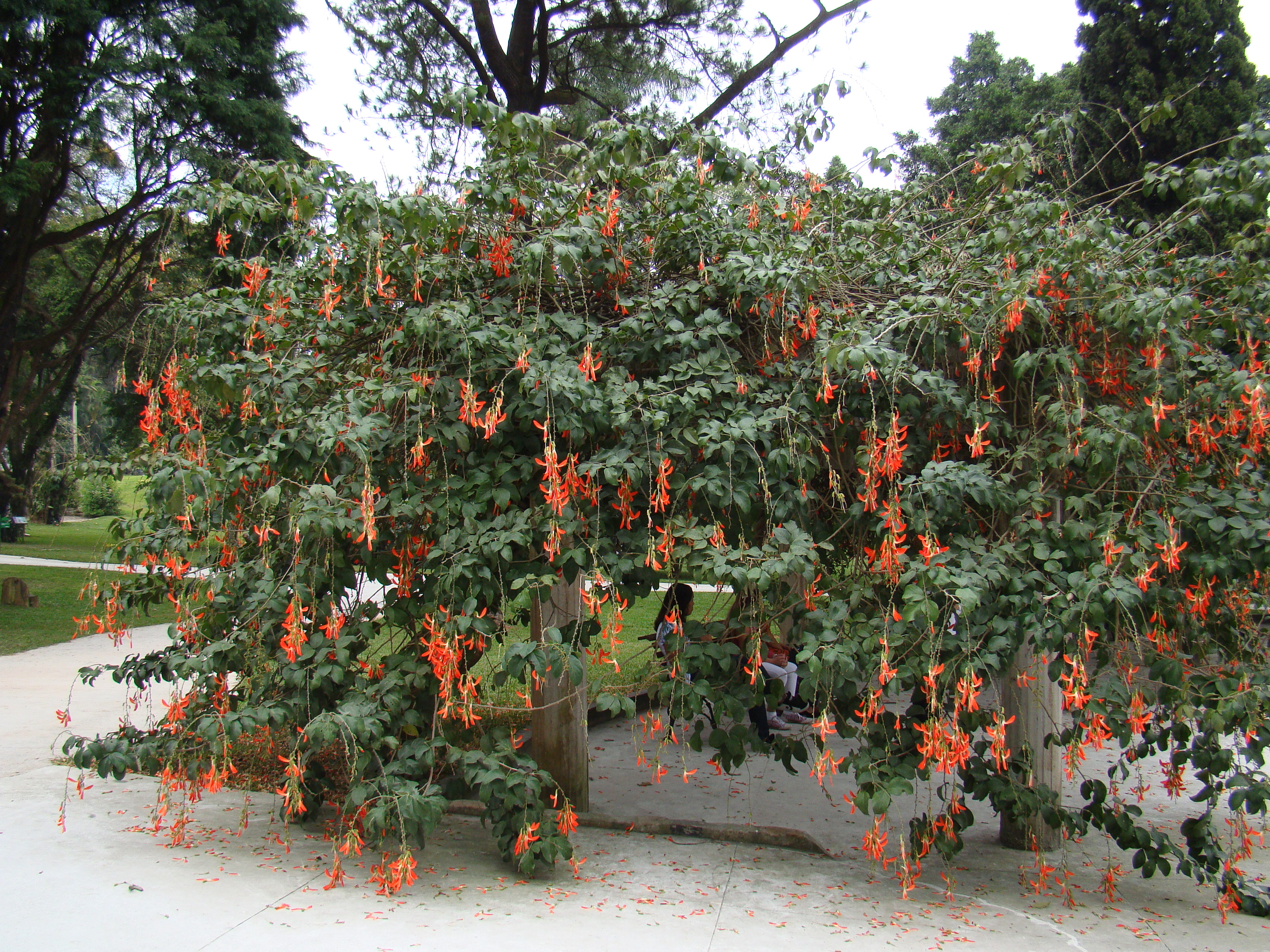 Crista-de-galo (Camptosema grandiflora), brazilian native. Sao Paulo Botanical garden